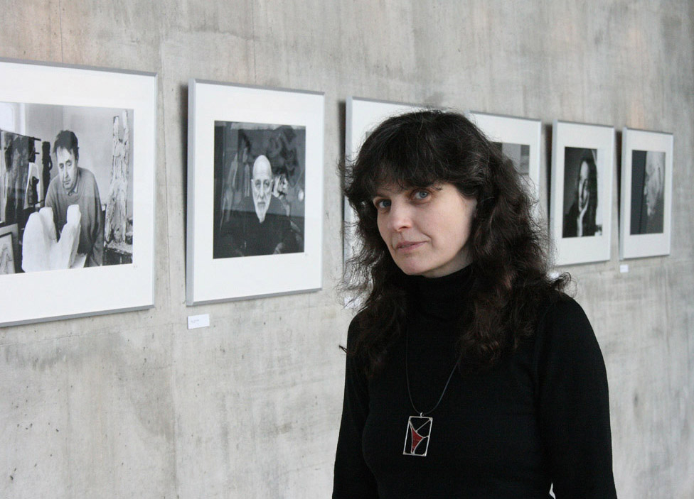 Elisath Heinemann